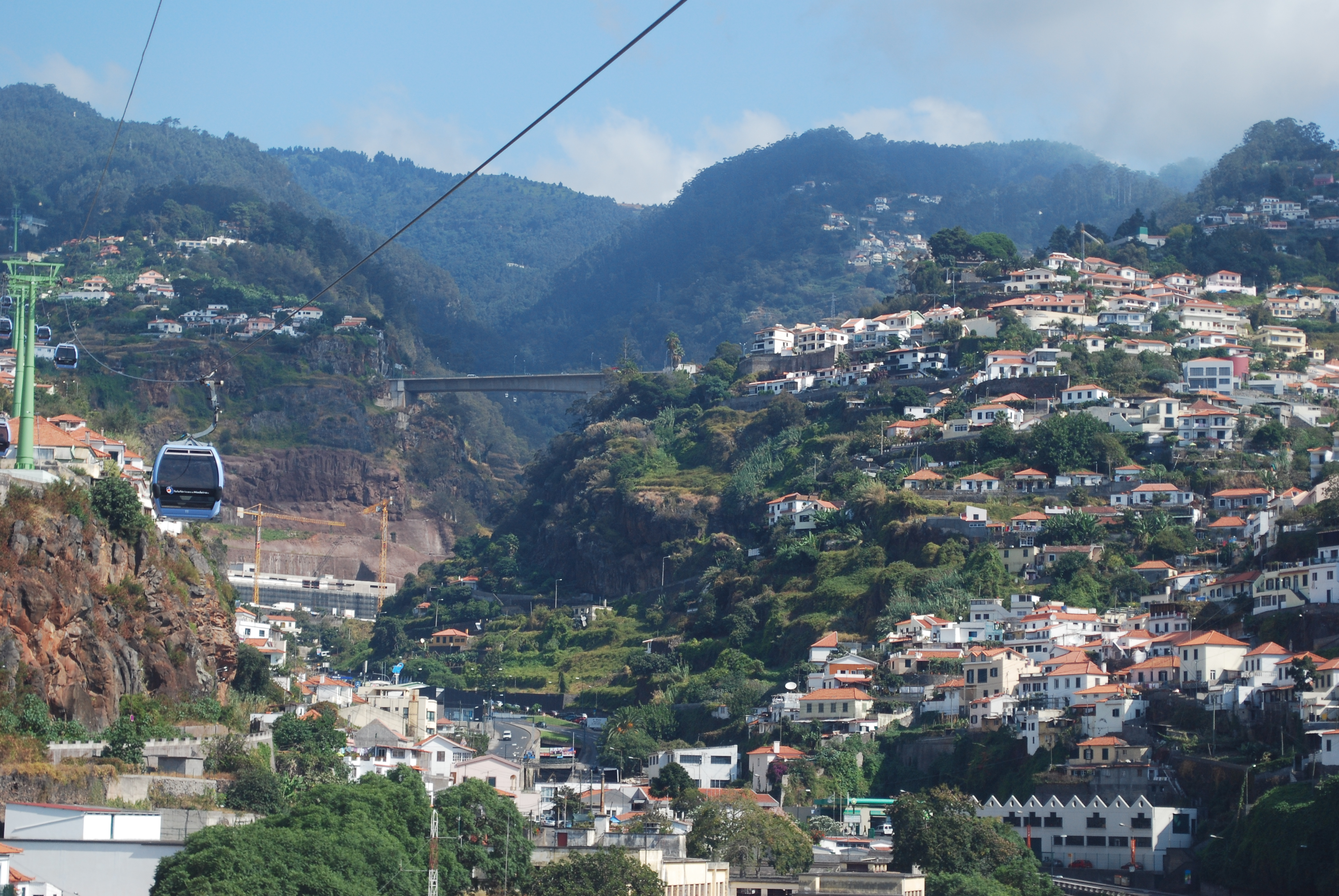 Cable car to Monte